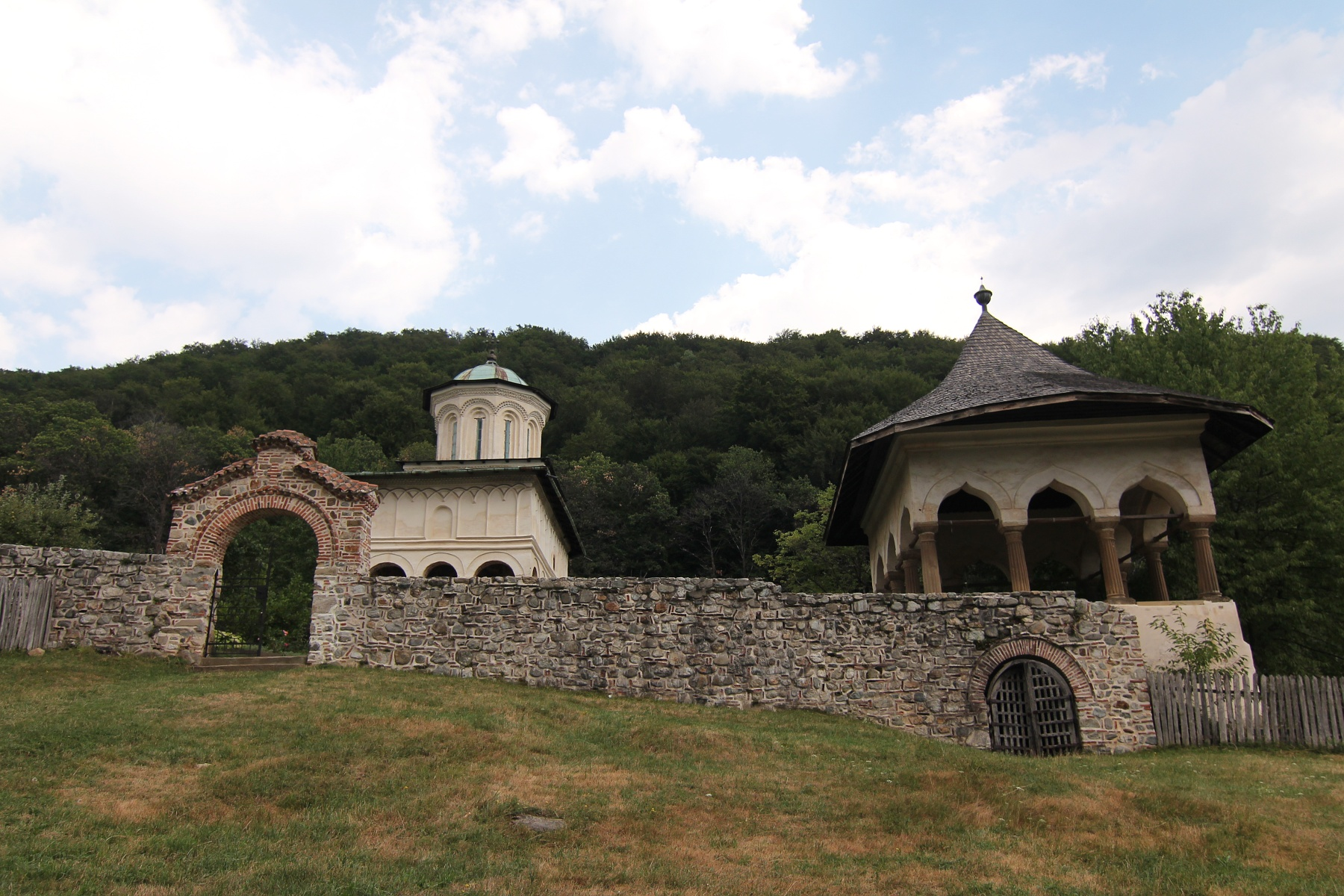 Ansamblul bolniței mănăstirii Hurezi